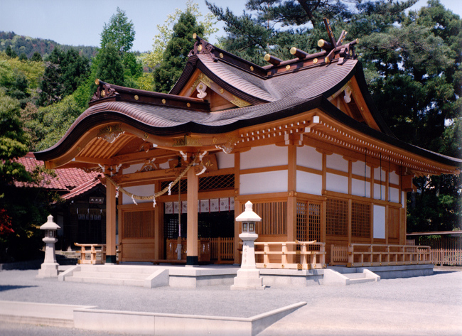 京都八瀬にある九頭竜大社の本殿です。